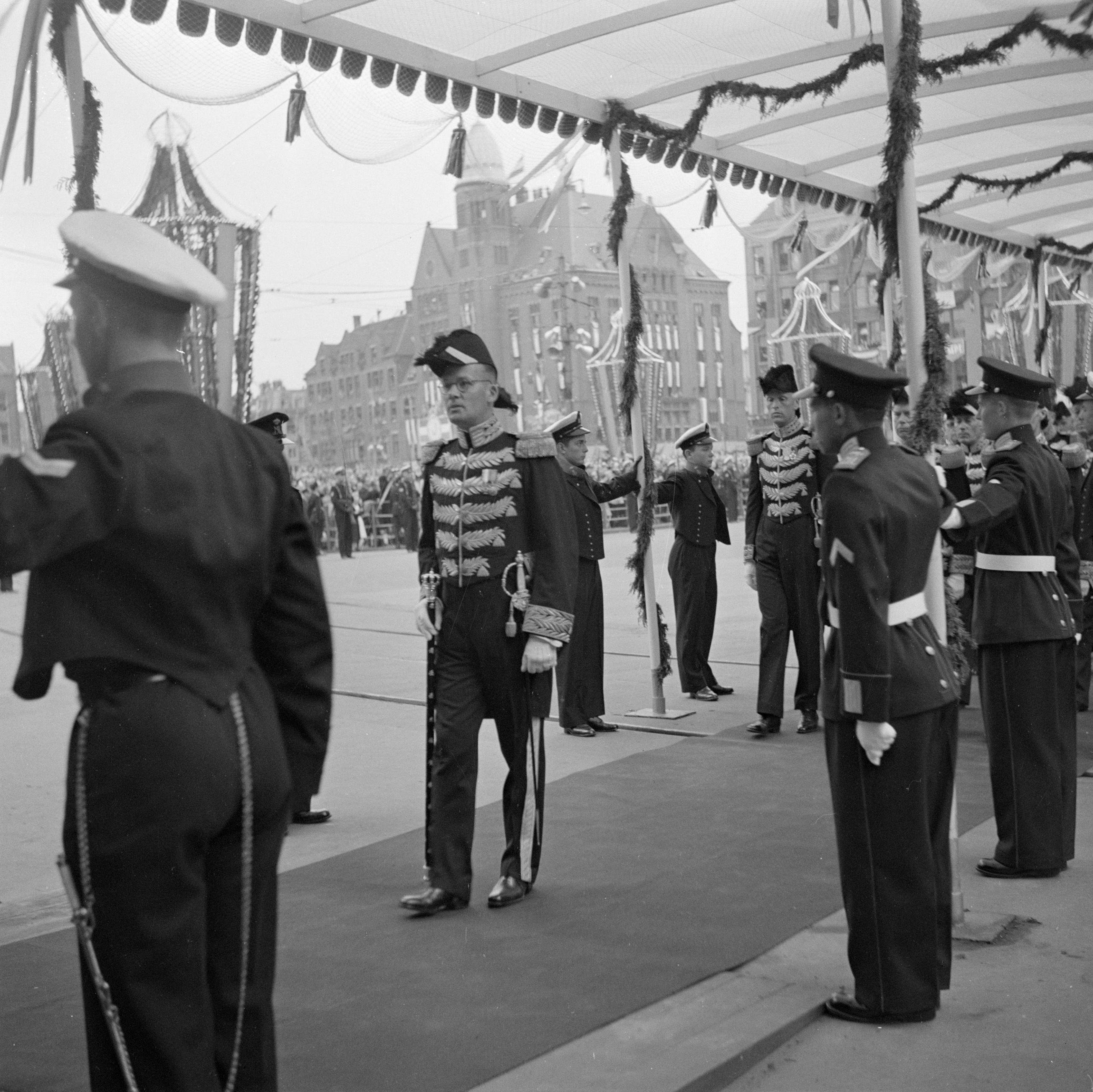 Collectie / Archief : Fotocollectie Van de Poll Reportage / Serie : Troonsafstand koningin Wilhelmina / Inhuldiging van koningin Juliana Beschrijving : Maandagochtend (volgnummer 13-39). De koninklijke stoet onder de pergola, van het paleis op weg naar de Nieuwe Kerk. De ceremoniemeester, jhr. D.G. de Graeff, gaat vooraf aan de lange rij Kamerheren (twaalf), Hoofden van Hofdepartementen (zes) en Grootofficieren (drie). Datum : 6 september 1948 Locatie : Amsterdam, Noord-Holland Trefwoorden : ceremoniemeesters, hofhoudingen, inhuldigingen, koninklijk huis Persoonsnaam : Graeff, jhr. D. G. de Fotograaf : Poll, Willem van de Auteursrechthebbende : Nationaal Archief Materiaalsoort : Negatief (zwart/wit) Nummer archiefinventaris : bekijk toegang 2.24.14.02 Bestanddeelnummer : 255-7088